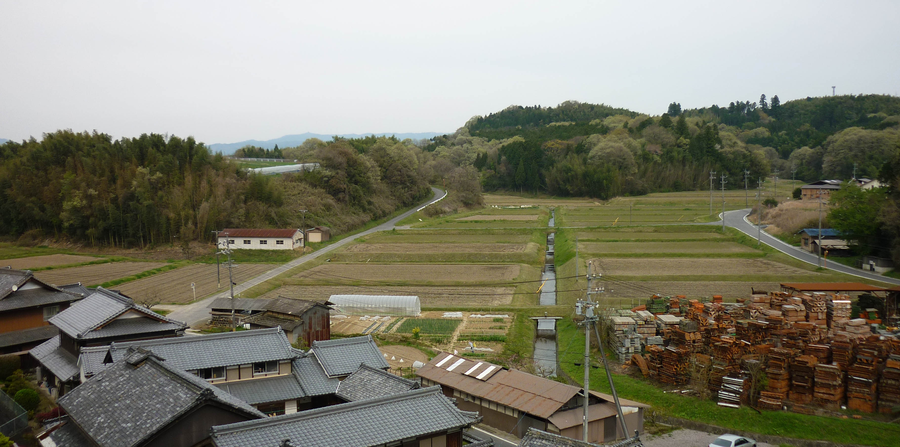 主郭からの眺望